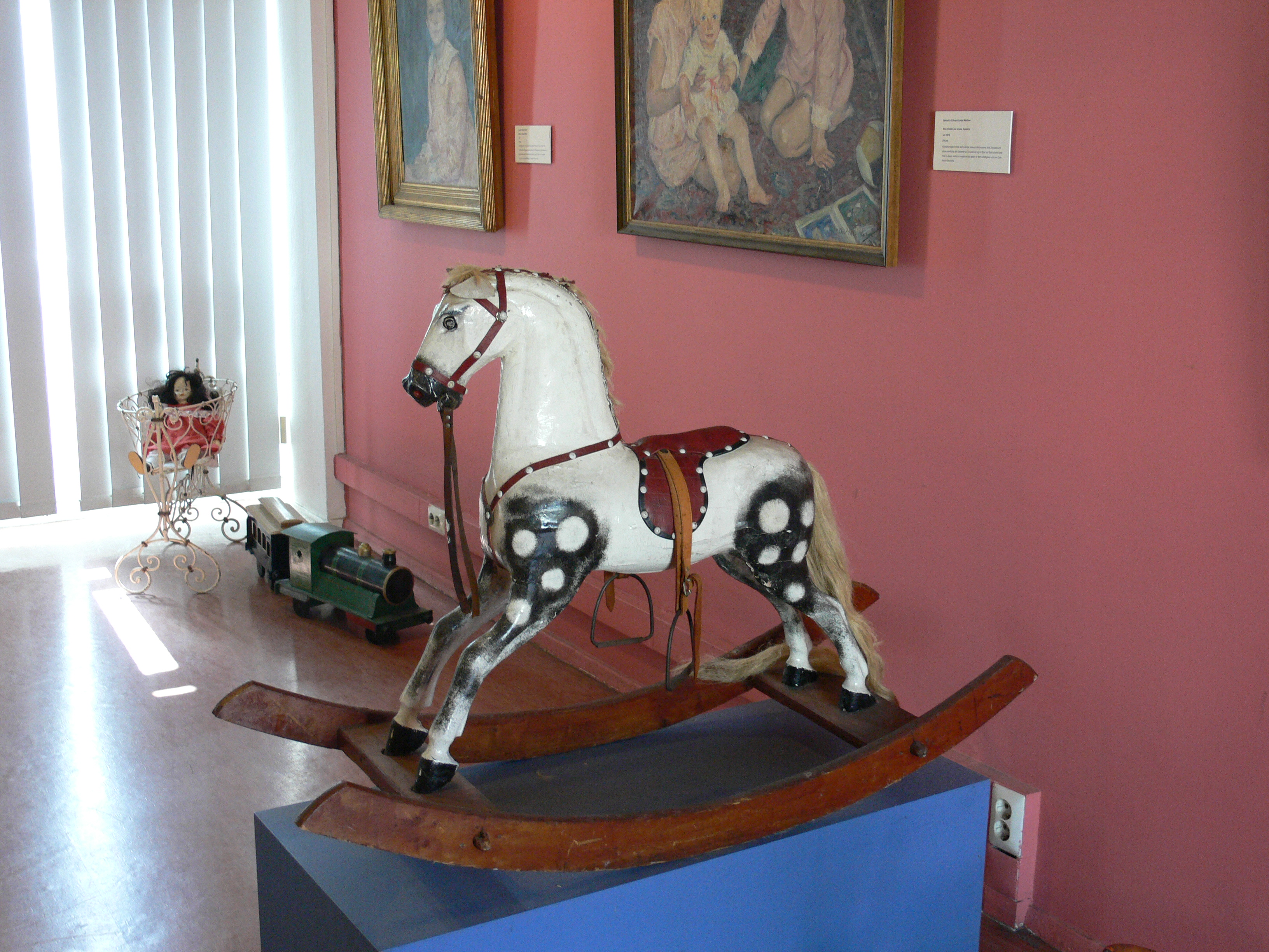 Sammlung Kindheit und Jugend (Stiftung Stadtmuseum Berlin) Schaukelpferd